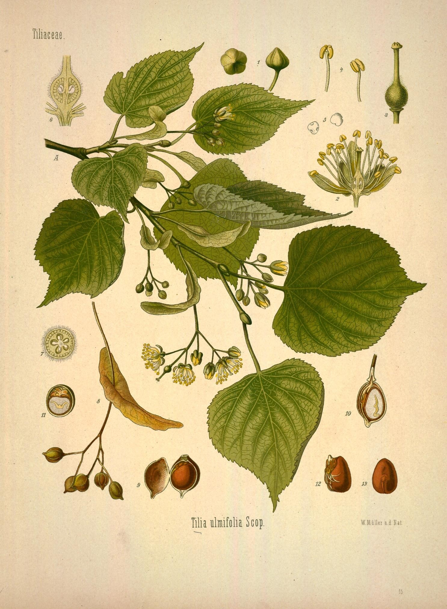 Winter-Linde. A Pflanze in natürl. Grösse; 1 Blüthenknospe von verschiedenen Seiten, vergrössert; 2 Blüthe im Längsschnitt, desgl.; 3 Stempel, desgl.; 4 Staubgefässe, desgl.; 5 Pollenkörner, desgl.; 6 Stempel im Längsschnitt, desgl.; 7 Fruchtknoten im Querschnitt, desgl.; 8 Fruchtstand mit Deck- oder Flügelblatt, nat. Grösse; 9 geöffnete Frucht, vergrössert; 10 Frucht im Längsschnitt, desgl.; 11 dieselbe im Querschnitt desgl.; 12, 13 Same von verschiedenen Seiten, desgl.